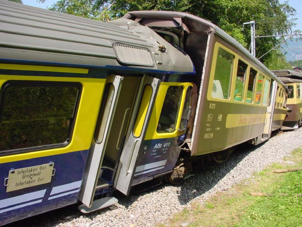 Eisenbahnunfall in Gsteigwiler am Donnerstag, 7. August 2003. Von links nach rechts die sehr stark beschädigten vordersten Wagen des Zuges 132/3232: Steuerwagen ABt 411, Zweitklasswagen B 273 und Triebwagen ABeh 4/4 313.